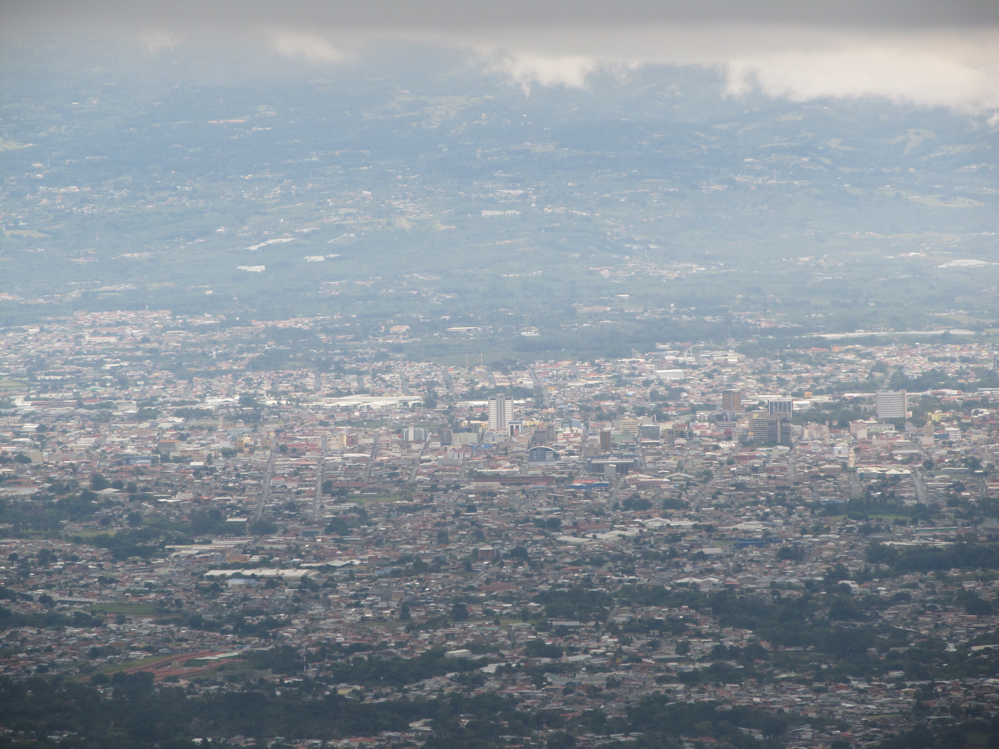 Vista de San José de Costa Rica desde Tarbaca, Aserrí, San José, Costa Rica.